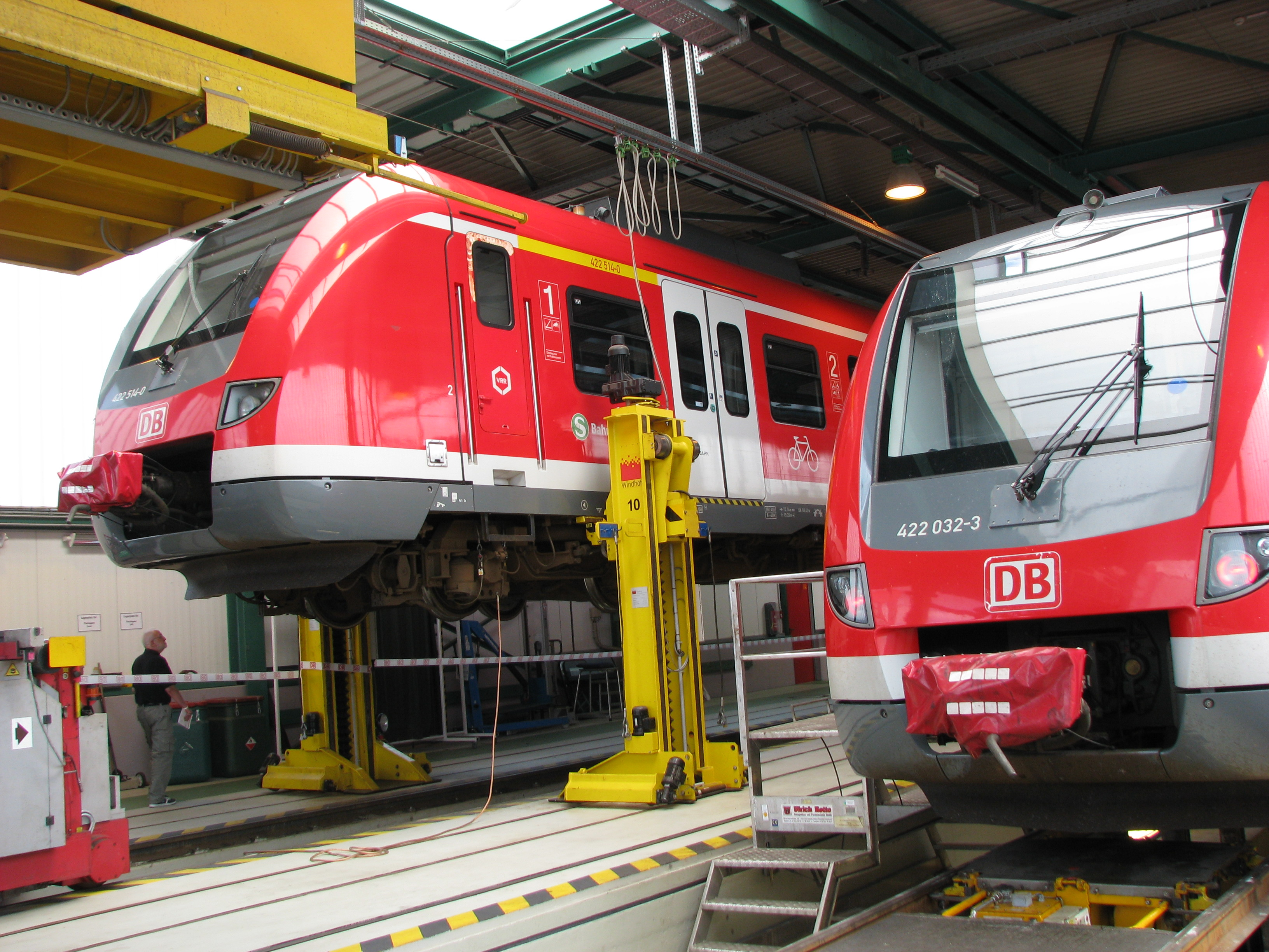 Elektrotriebwagen der S-Bahn Rhein-Ruhr der DB-Baureihe 422 im Bahnbetriebswerk in Essen. Links ein mit einer Hebebockanlage der Firma Windhoff Bahn- und Anlagentechnik angehobener Zug.